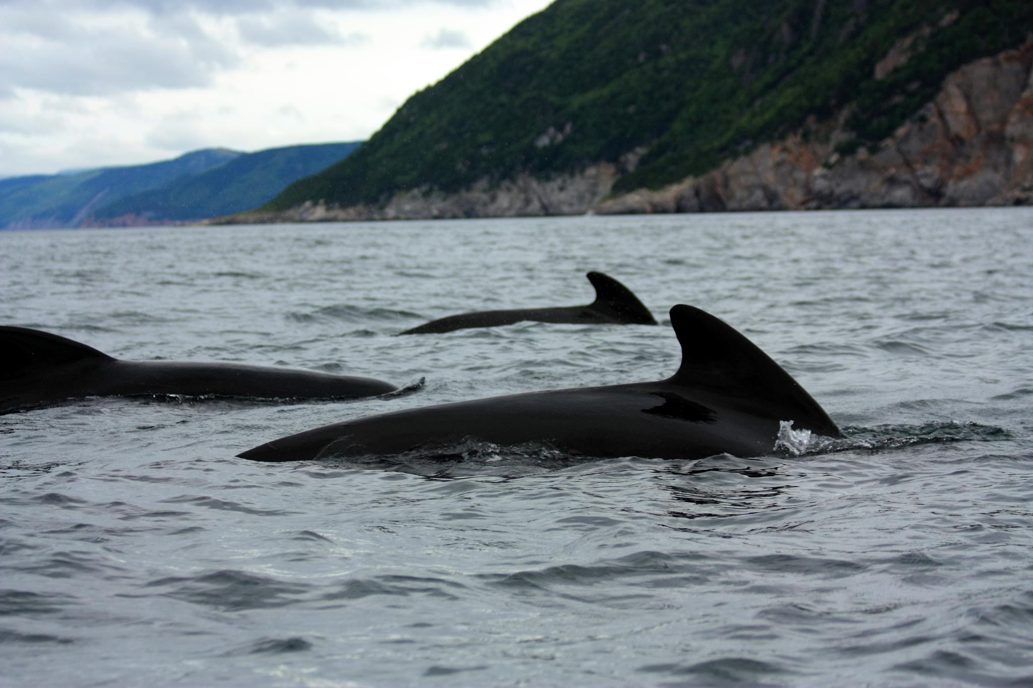 Groupe de globicéphale noir près de l'île du Cap-Breton